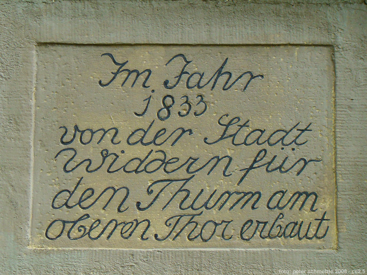 Inschriftenstein am Turmwächterhaus in Widdern